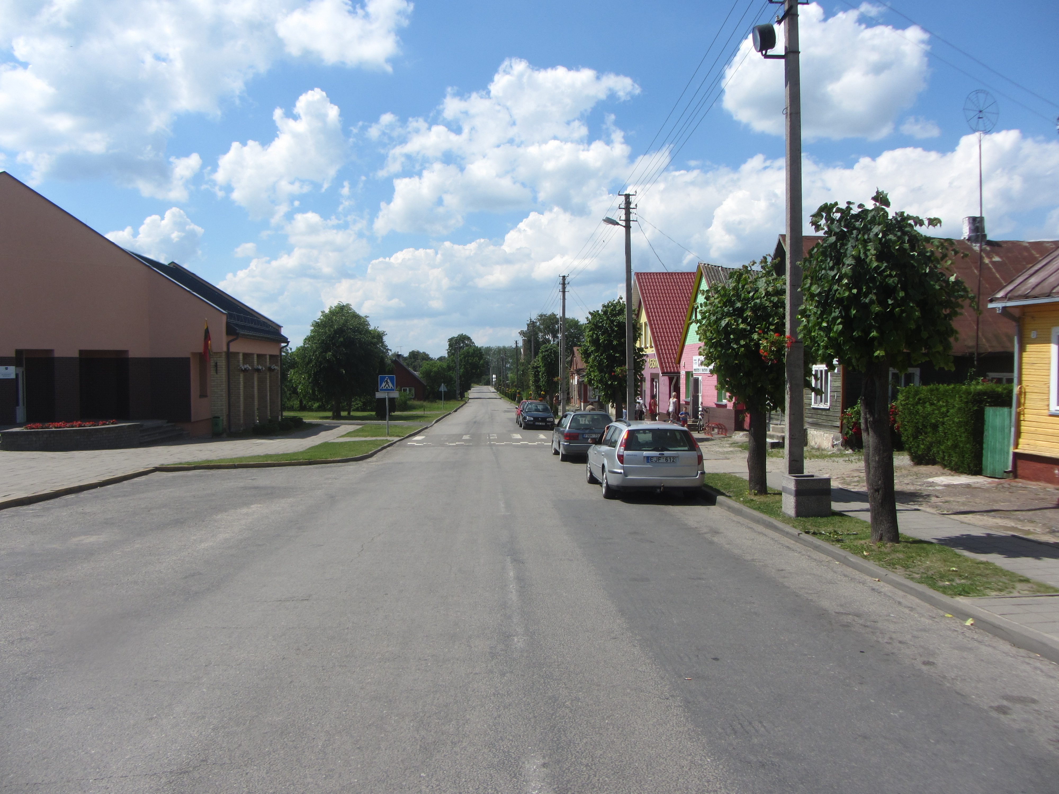 Butrimonys, Lithuania